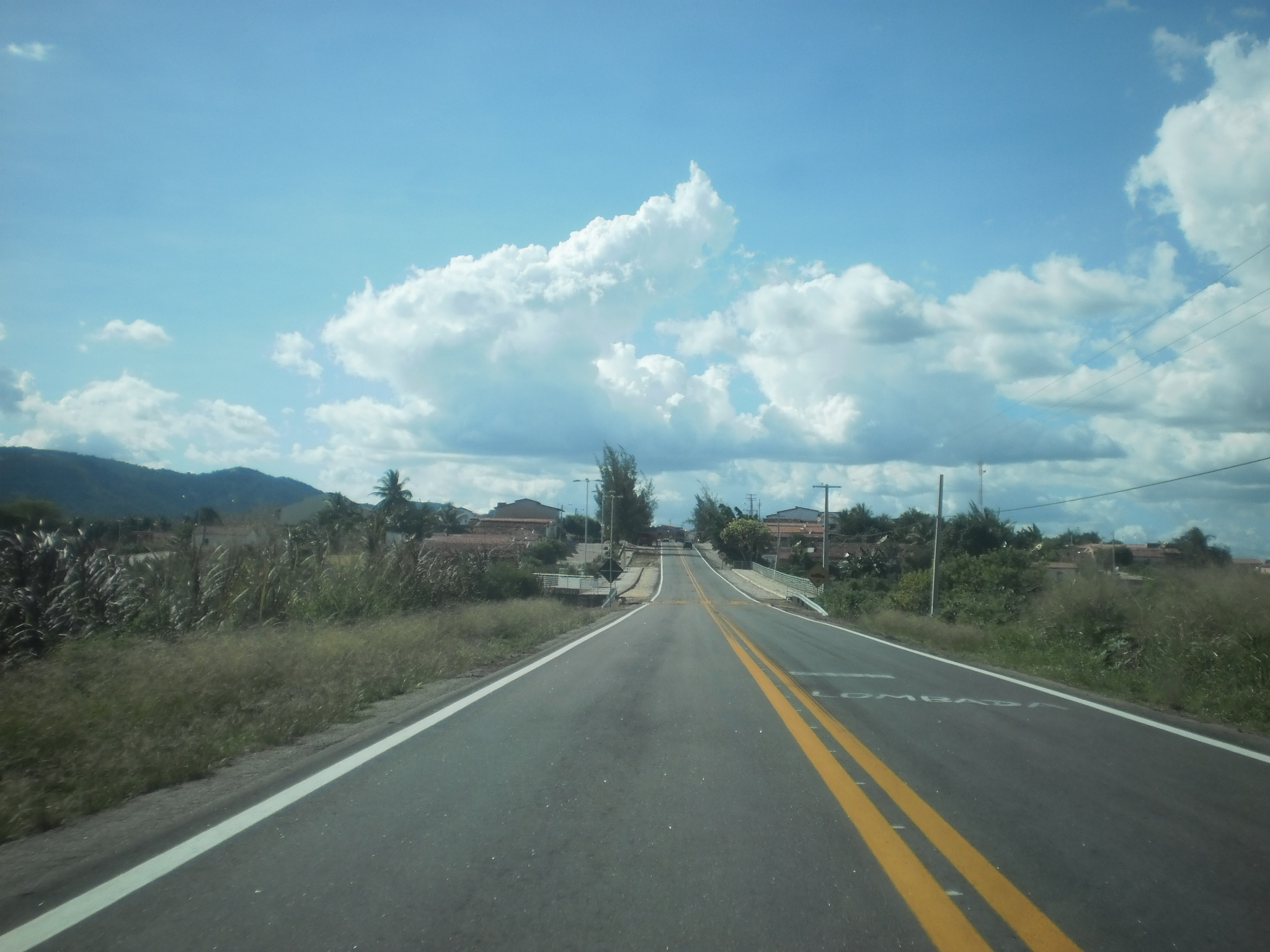 Entrada de Major Sales (RN), sentido sul-norte.